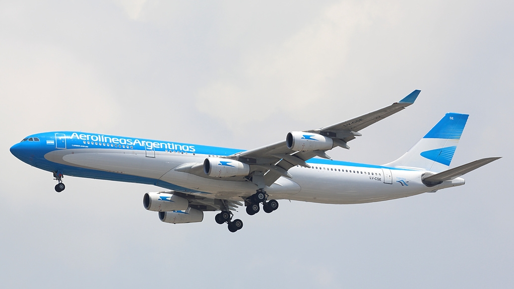 Proveniente de Ezeiza aterrizando en Caracas